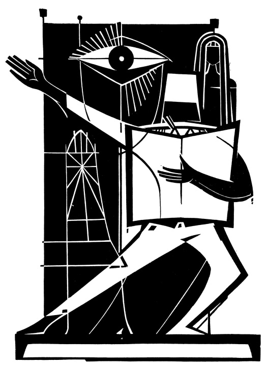 Werner Baumann, "Coppelius". Linolschnitt, 1962, 42cm x 29,5cm